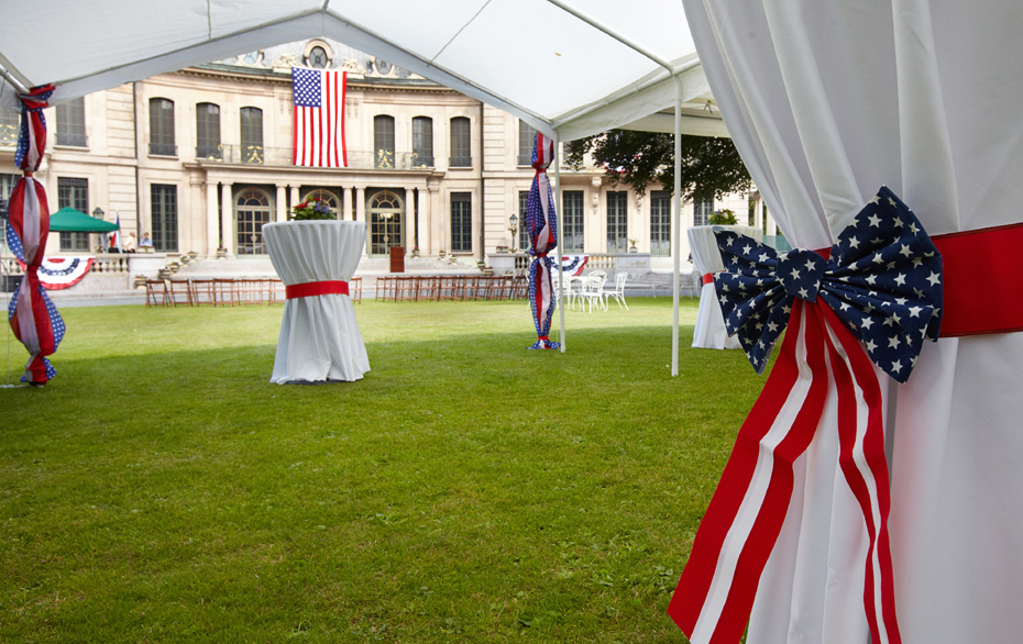 Oslava Dne nezávislosti USA v zahradě rezidence velvyslance USA v Praze v roce 2011.